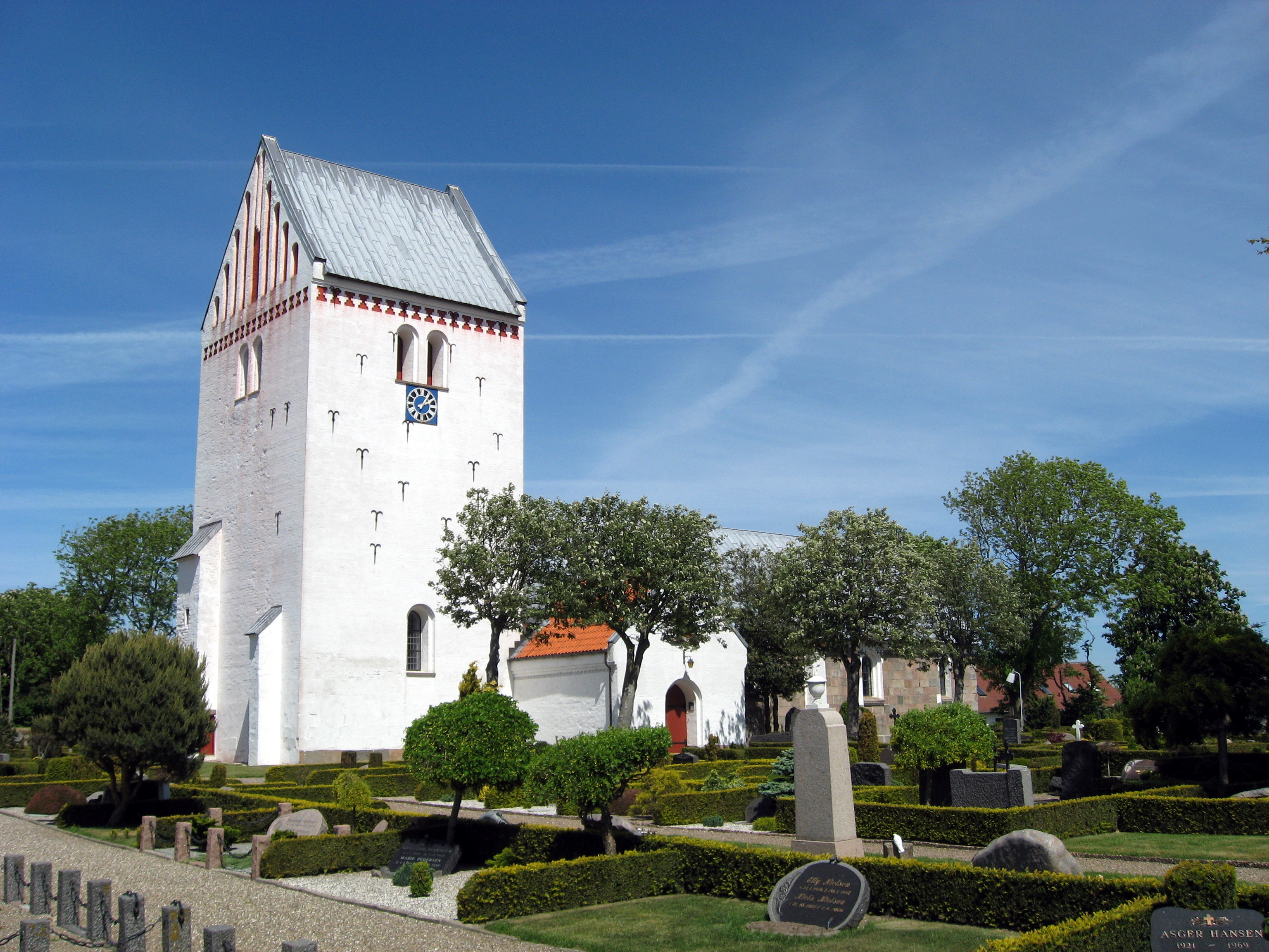 Vrensted Kirke « Vrensted Sogn « Hjørring Søndre Provsti « Aalborg Stift